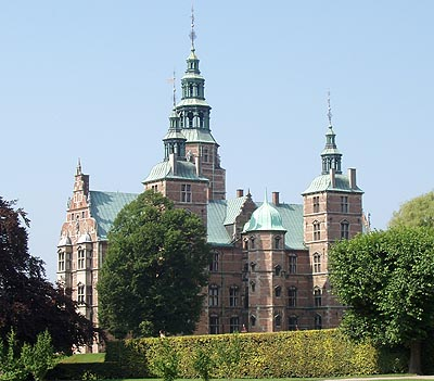 Rosenborg Castle